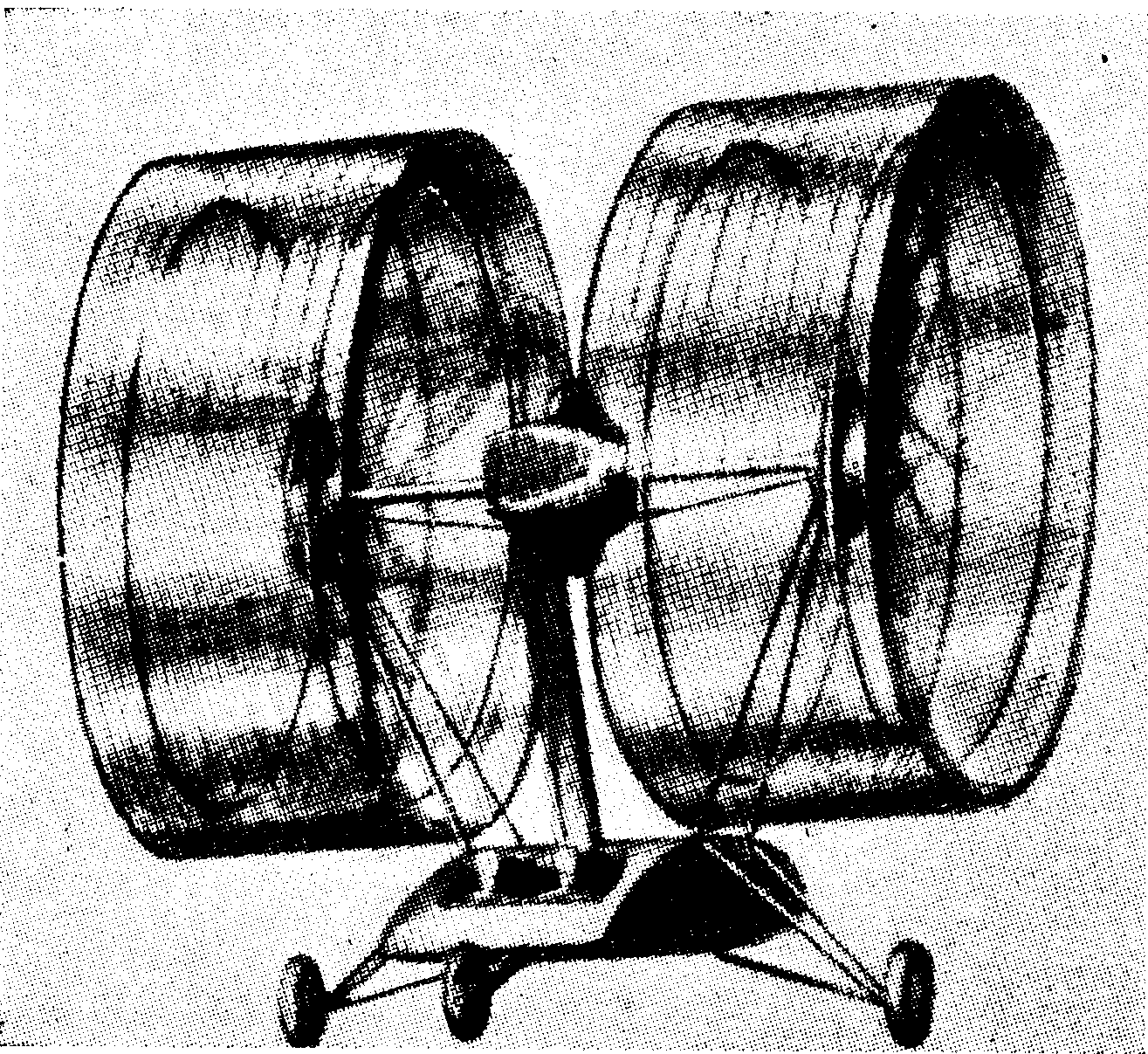 Strandgrens cyclogiro